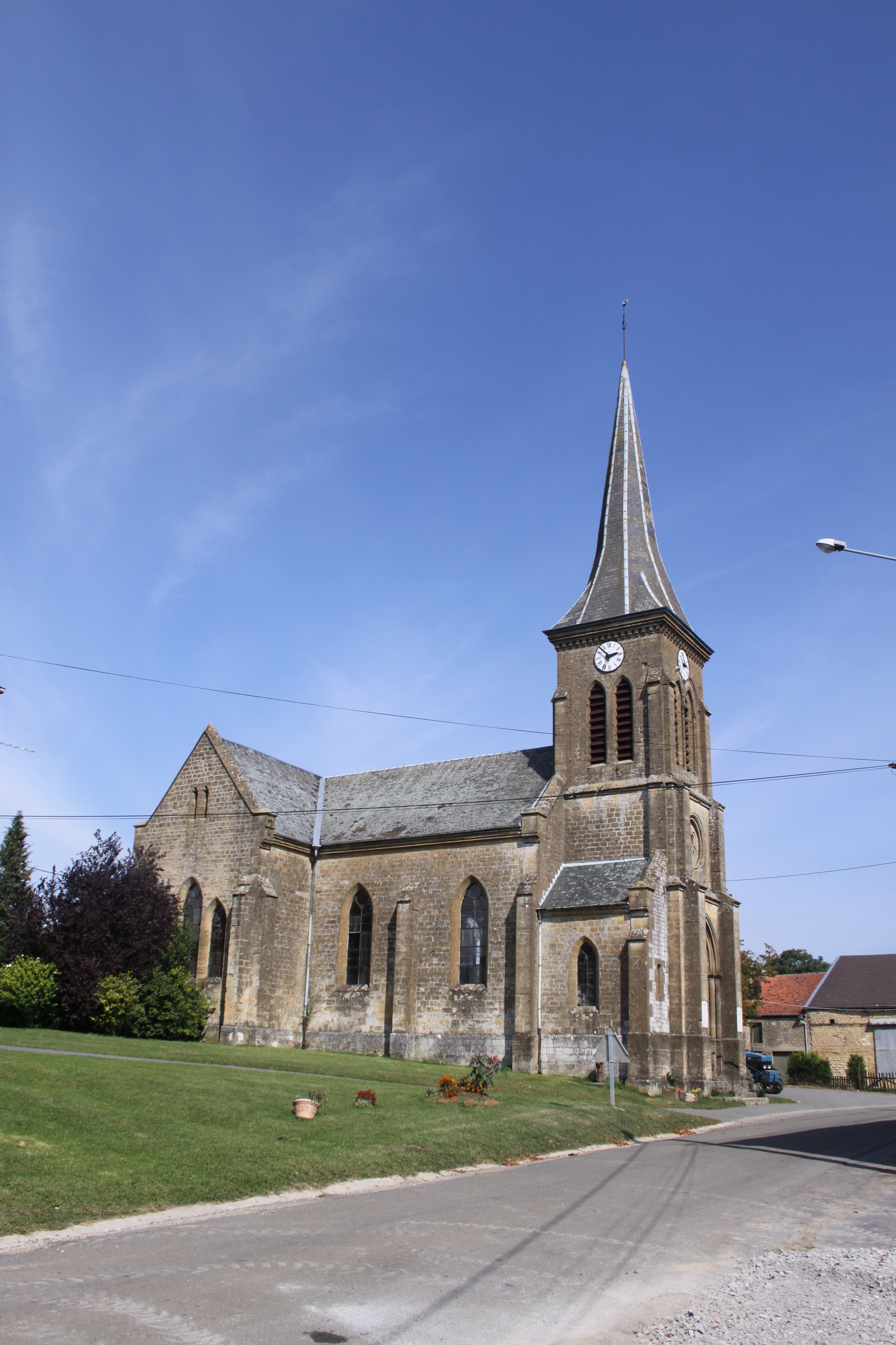 Village Ardennais